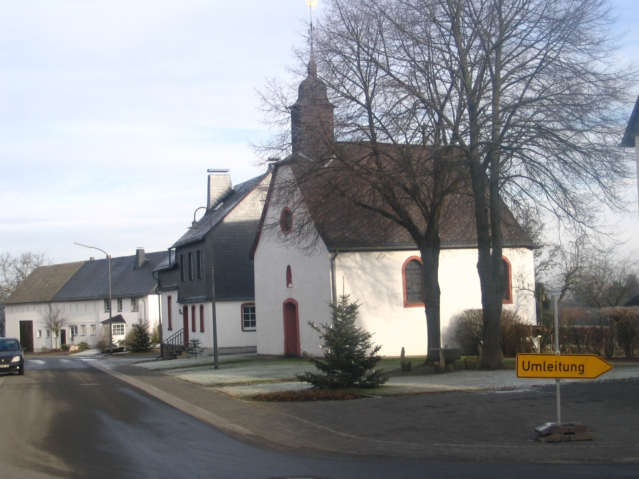 Kapelle und Hauptstrasse der Ortschaft Forst (Hunsrück)